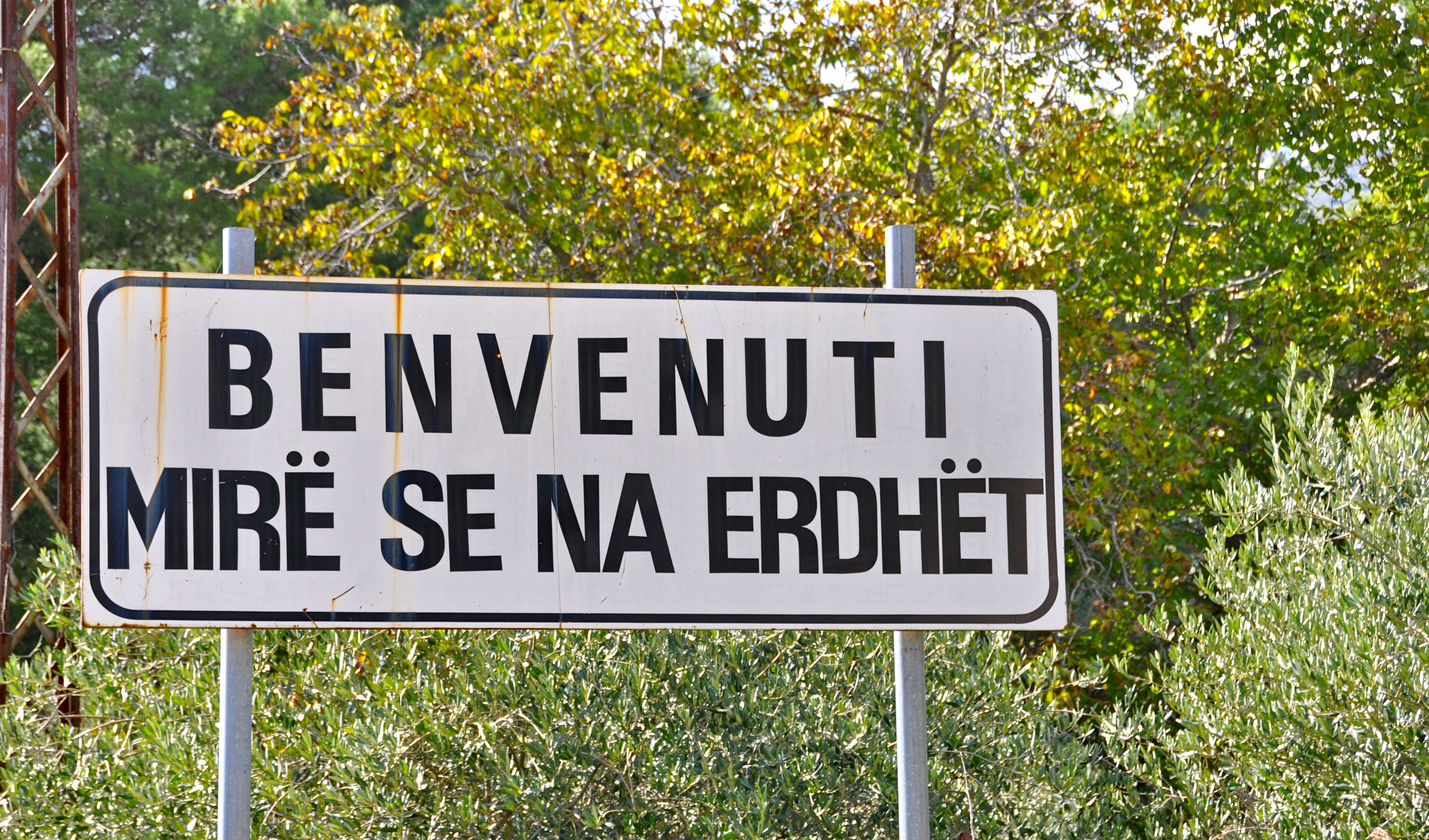 Insegna bilingue, in italiano e in albanese: Benvenuti - Mirë se na erdhët.